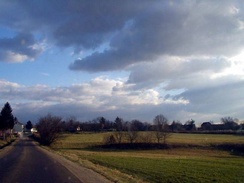 Kabal - Entrance